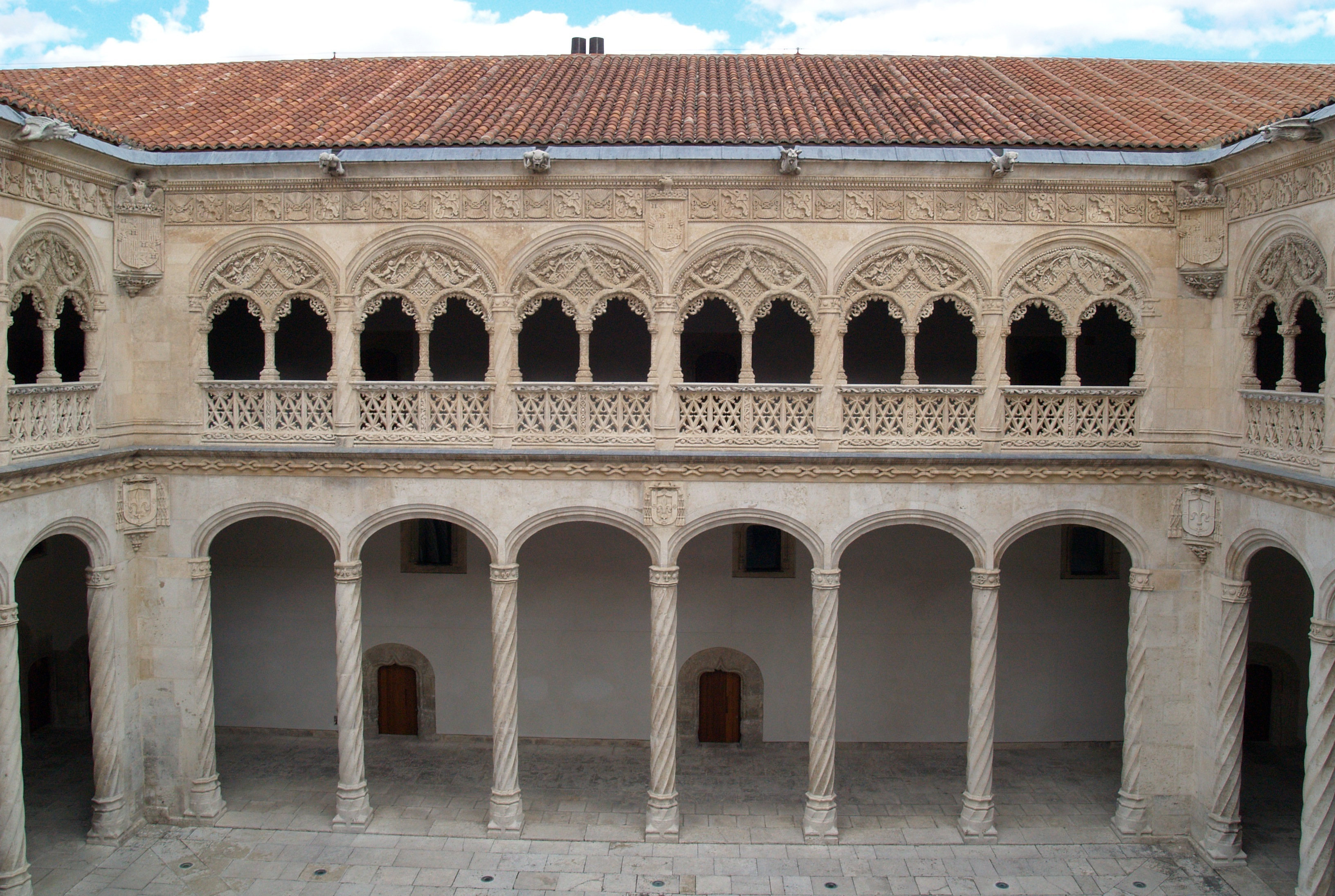 Valladolid. Colegio de San Gregorio. Patio.